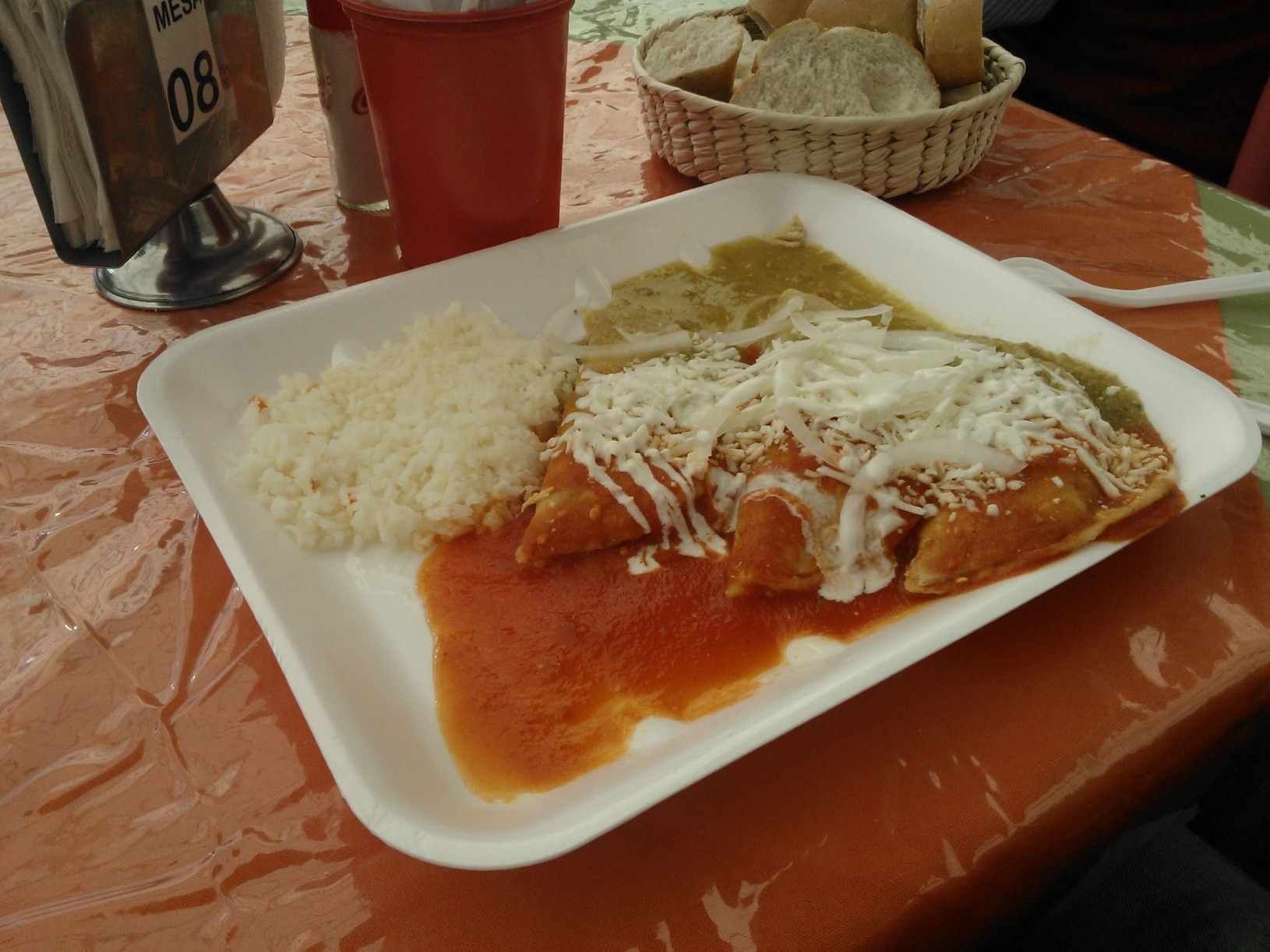 Fotografía de enchiladas rellenas de pollo con arroz cubiertas en salsa verde y roja, dentro del Festival turístico y gastronómico de la Enchilada, que se llevó a cabo en el Jardín Cuitláhuac, en la delegación Iztapalapa.